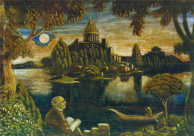 1933 г. Матэр'ял і тэхніка палатно, алей Памеры 95 х 135 Месцазнаходжанне Глыбоцкі гісторыка-этнаграфічны музей